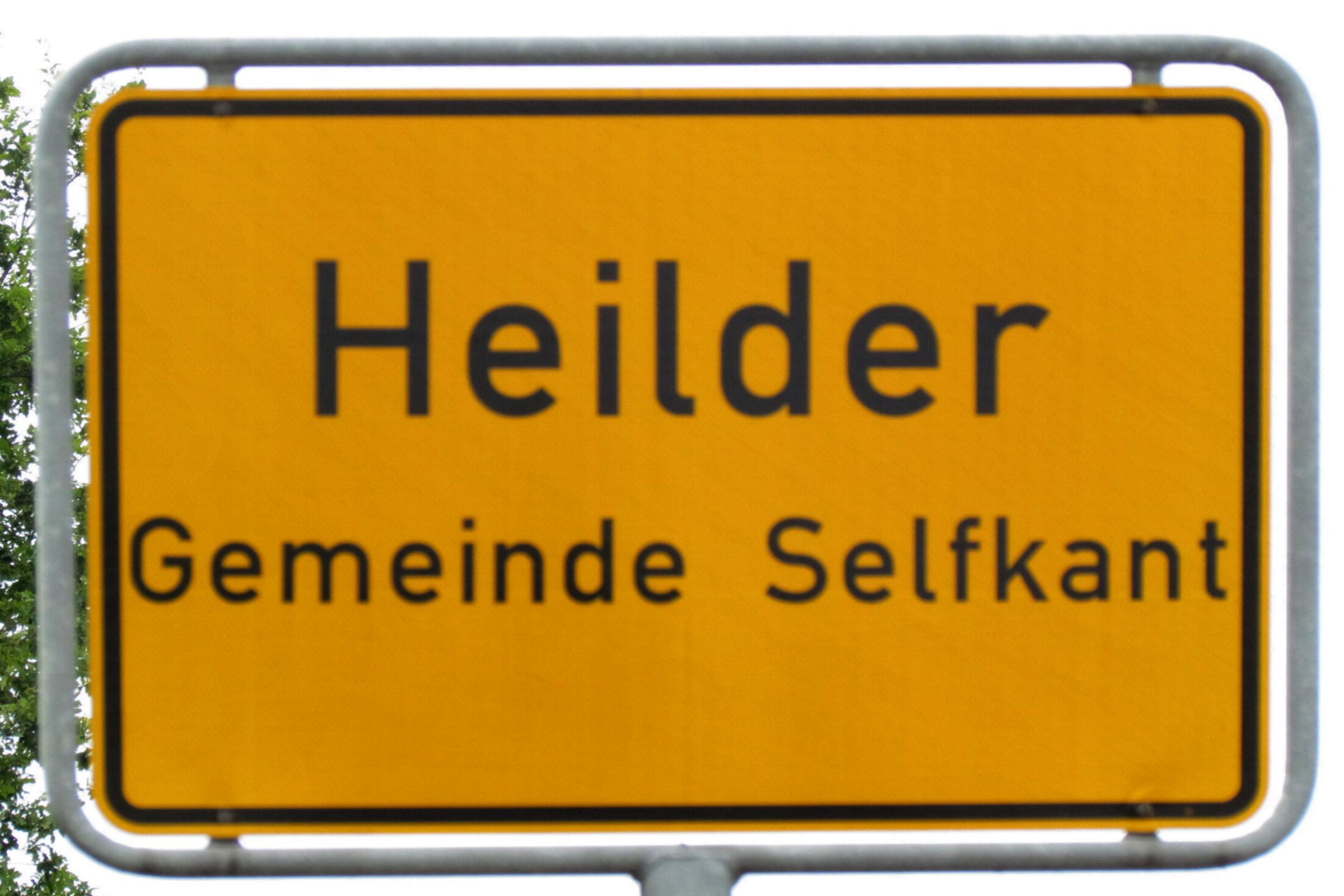 Heilder Ortsschild